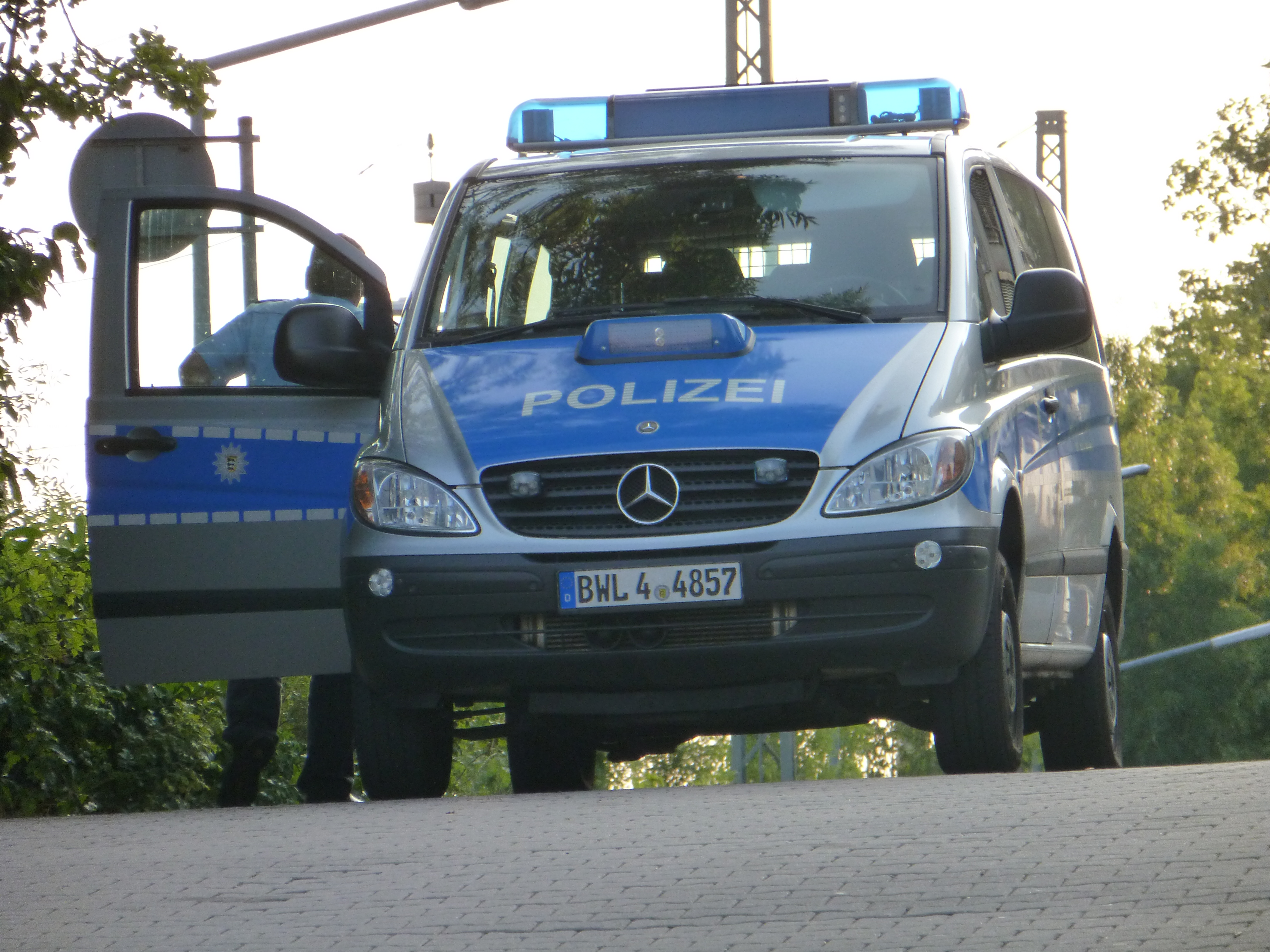 Camionnette de police à Pforzheim.